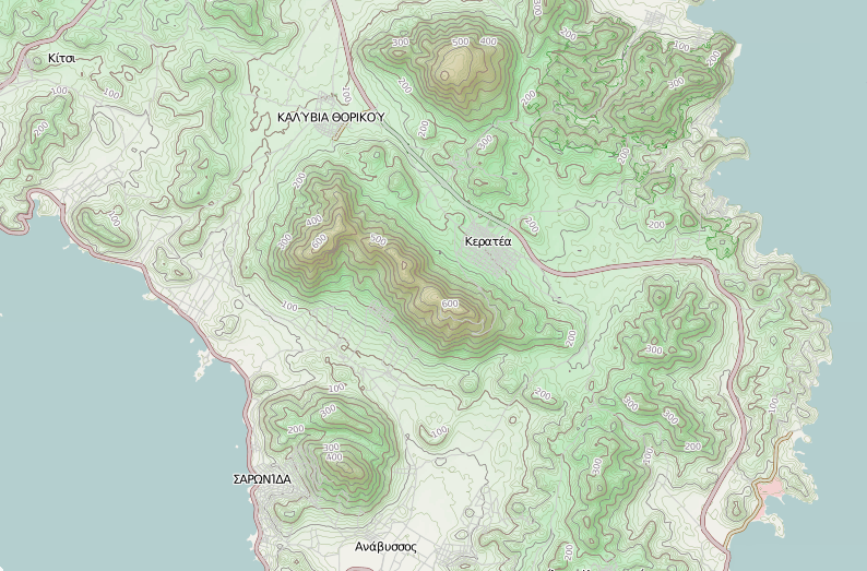 Τοπογραφικός χάρτης των Μεσογείων